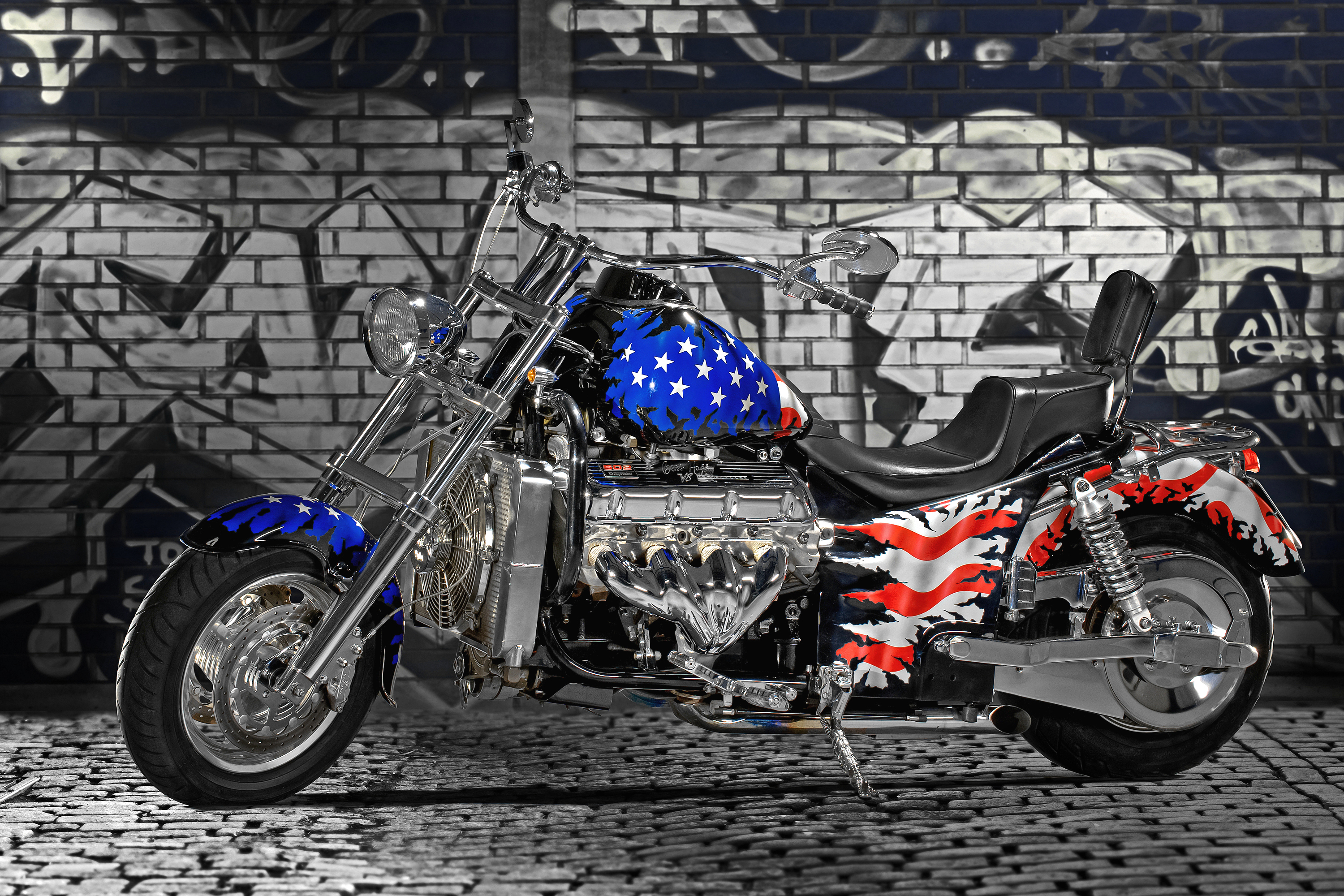 Fotomontage, einer im Studio mit Blitztechnik aufgenommenen BOSS HOSS. Anschließend wurde der Hintergrund-Untergrund durch digitale Bildbearbeitung eingefügt. Bei dieser BOSS HOSS handelt es sich um ein Big-Block-Model mit einem 8,2 Liter, V8 Chevrolet Motor.